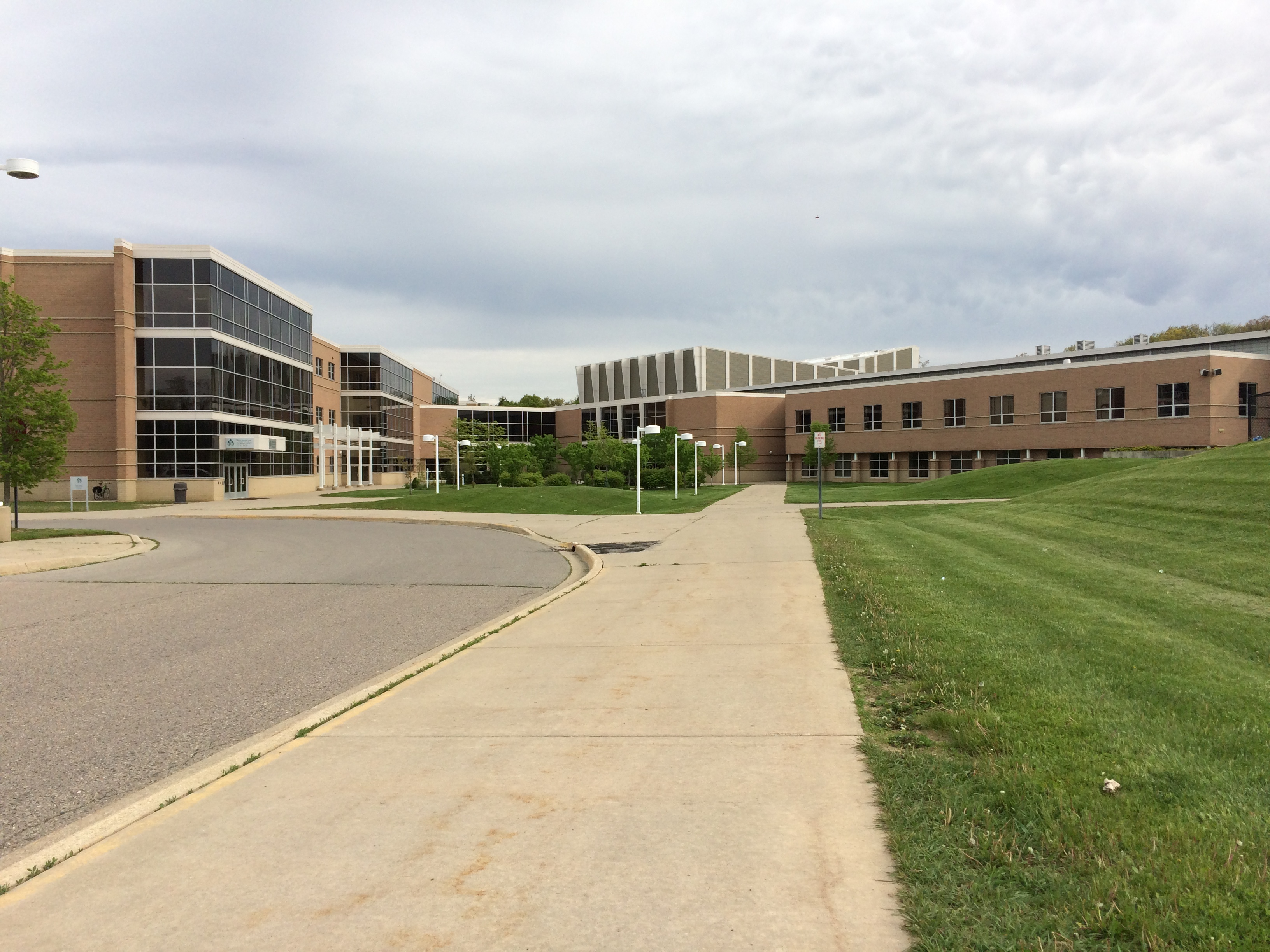 Dexter High School